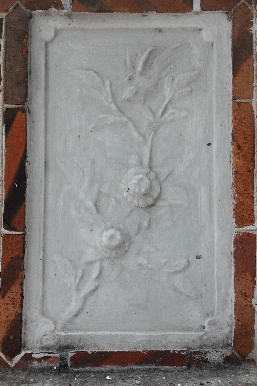 樹林聖蹟亭花卉泥塑,新北市樹林區潭底里